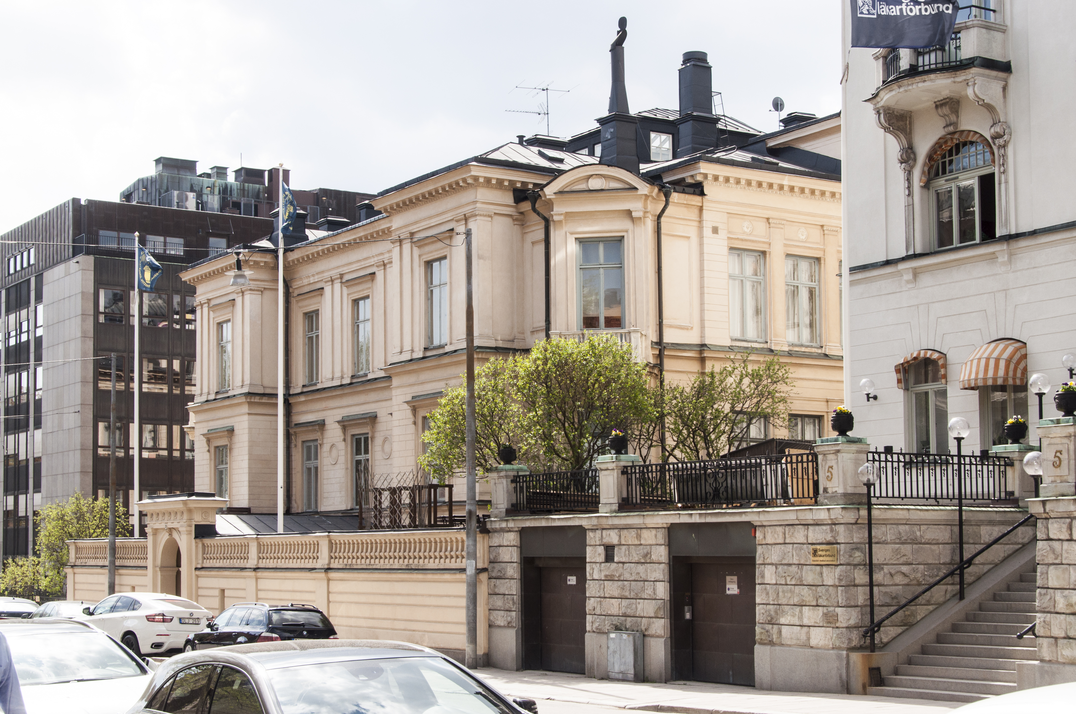 Villagatan 3. Byggnadsår 1878-79, arkitekter och byggherrar Axel & Hjalmar Kumlien, byggmästare A G Söderlund.